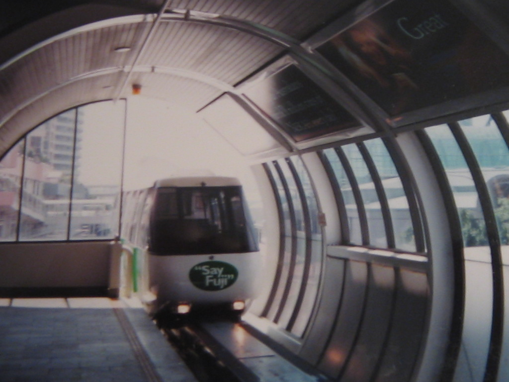 Monorailhalte in Sydney.